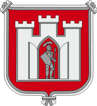 Nowy herb Wiślicy (2018)